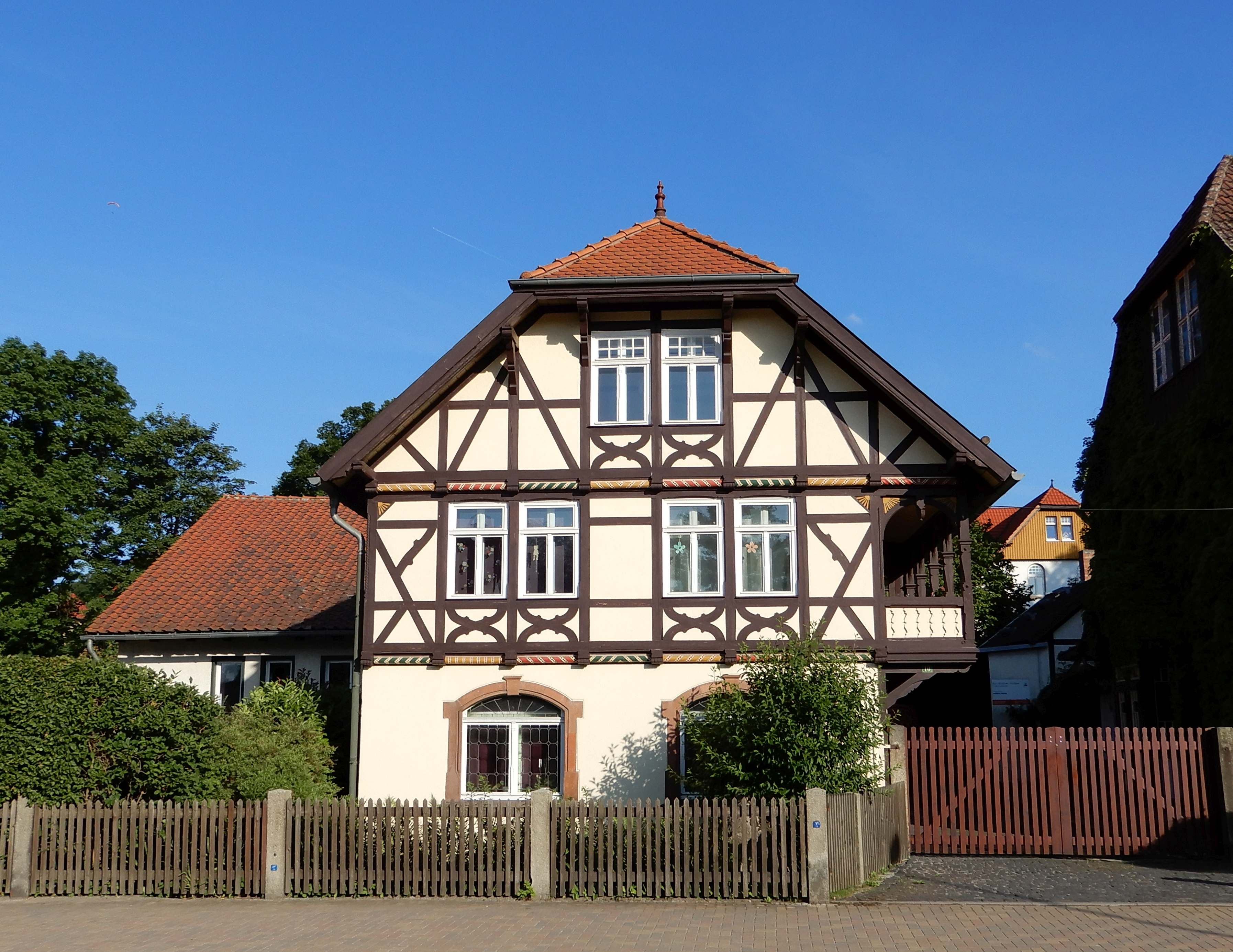 Wohnhaus in der Friedrichstraße in Hasserode